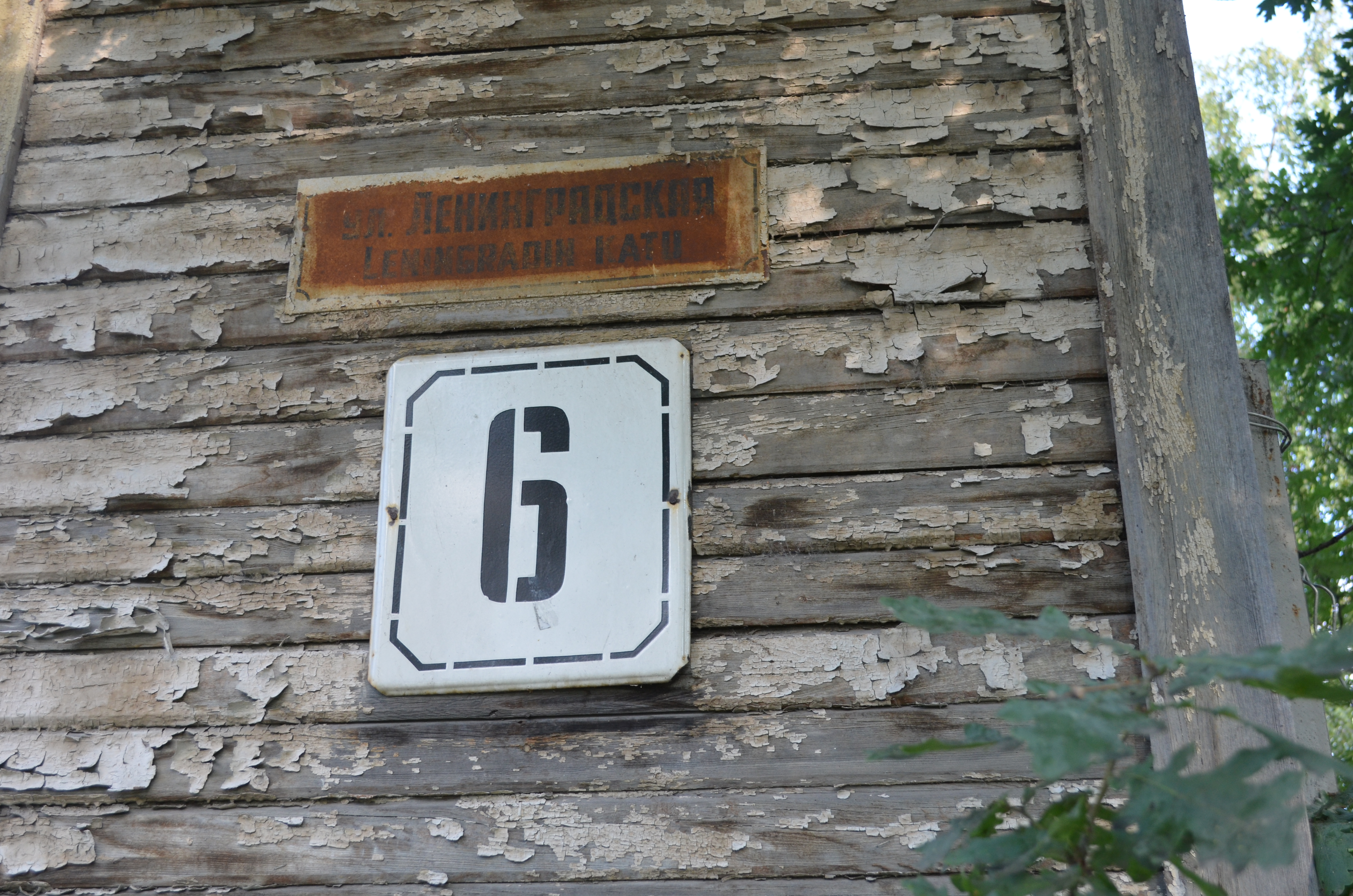 м. Петрозаводськ. Вул. Ленінградська. Двомовний напис